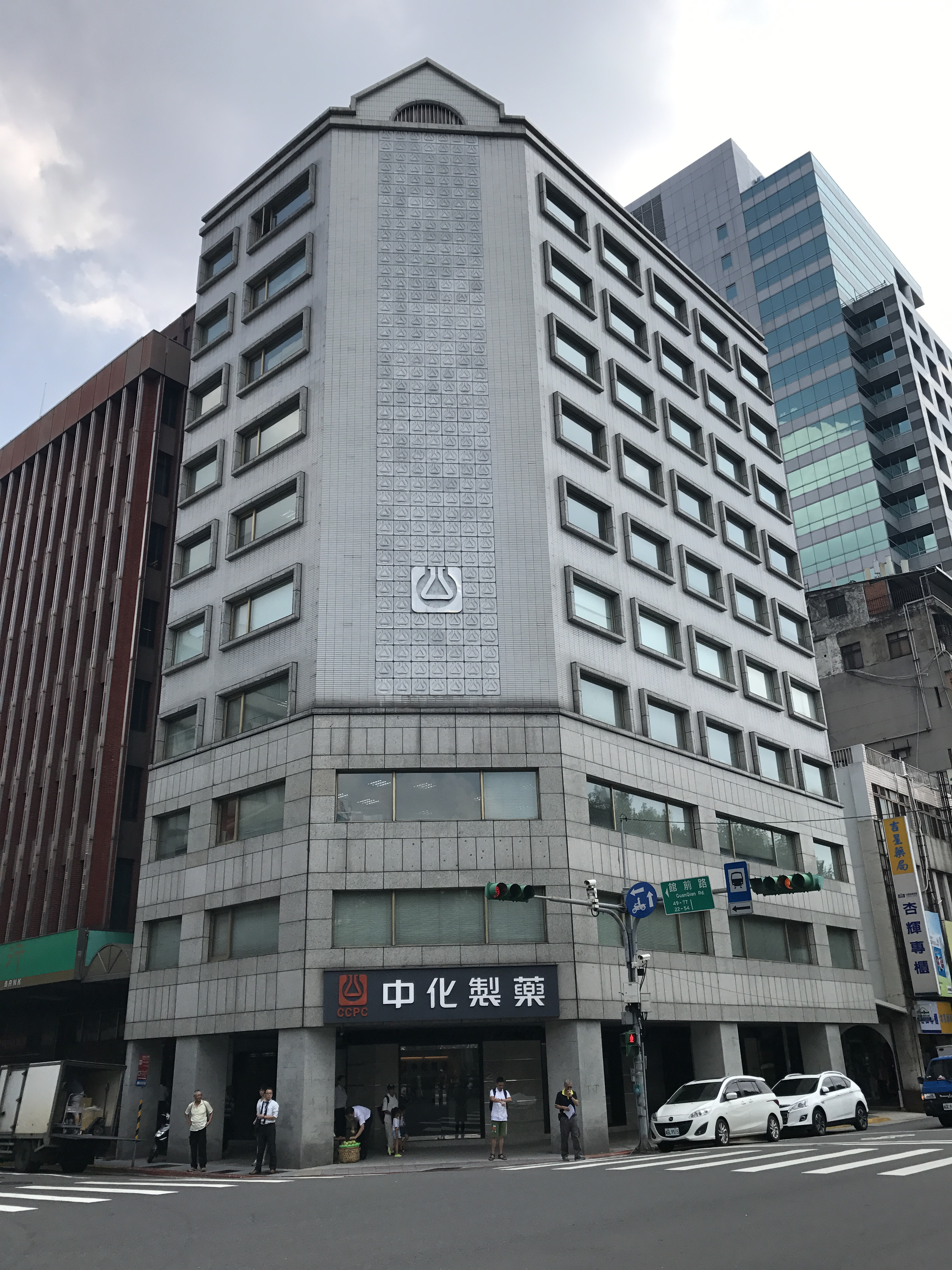 中國化學製藥總部，位於臺北市中正區襄陽路23號（襄陽路與館前路口）。